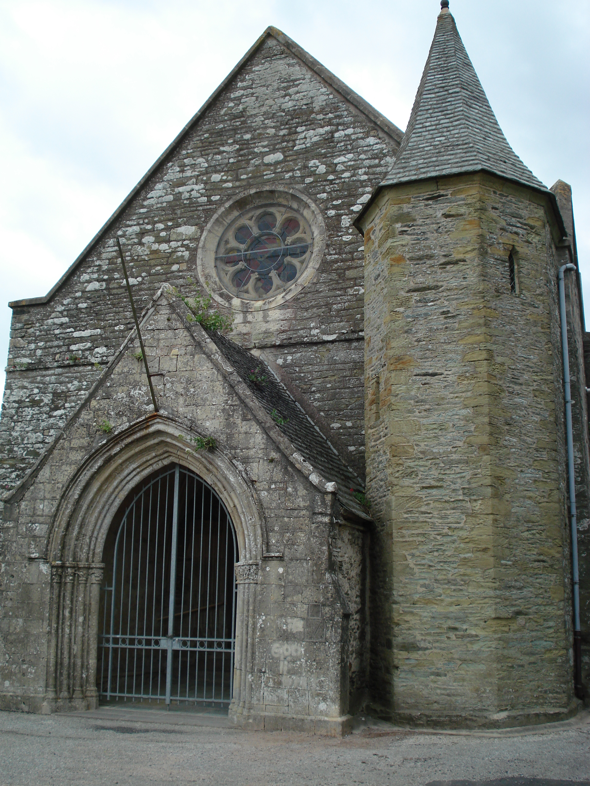 Église Notre-Dame de Tourlaville